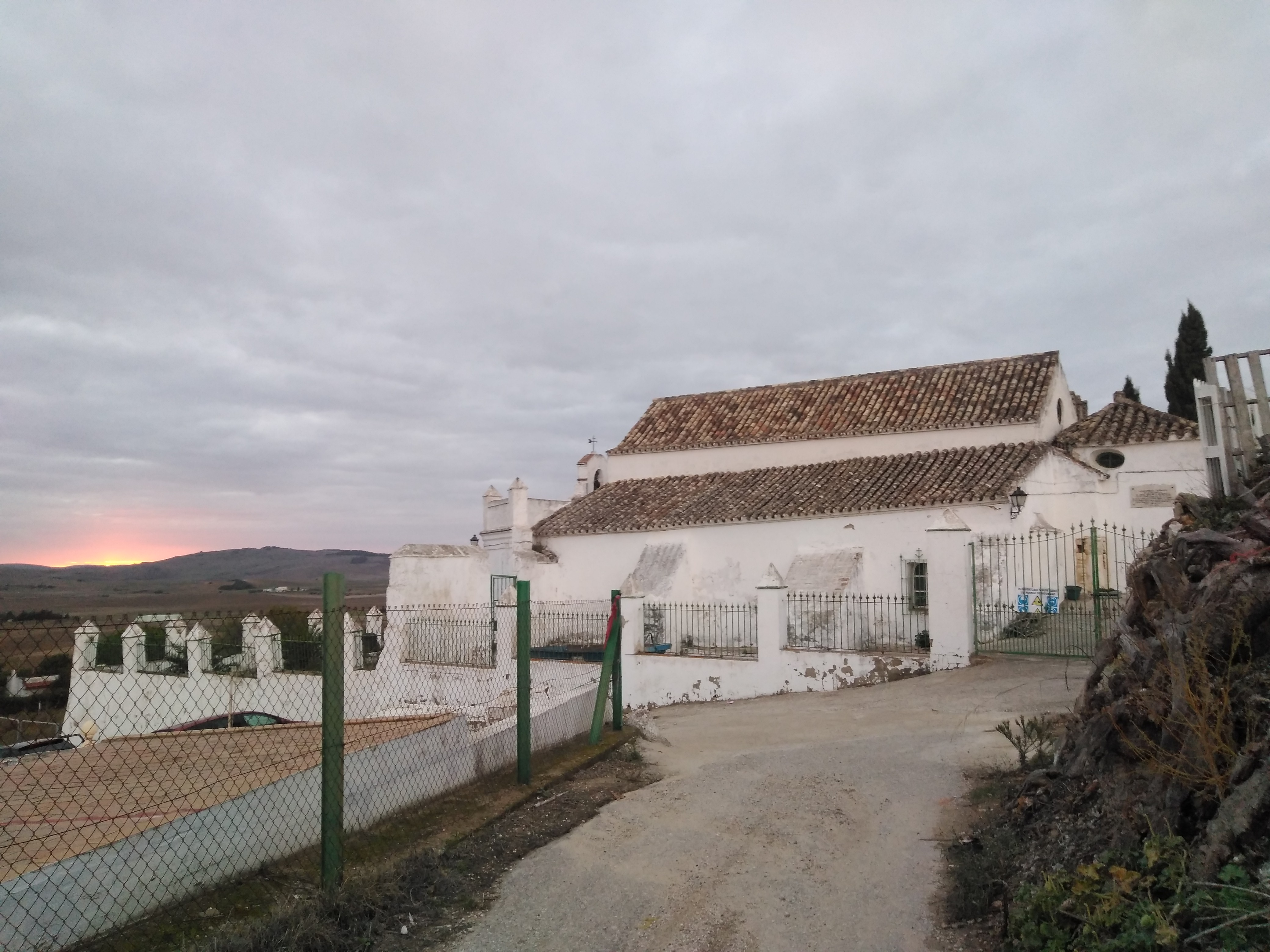 Ermita de los Santos Mártires (Medina-Sidonia, España)